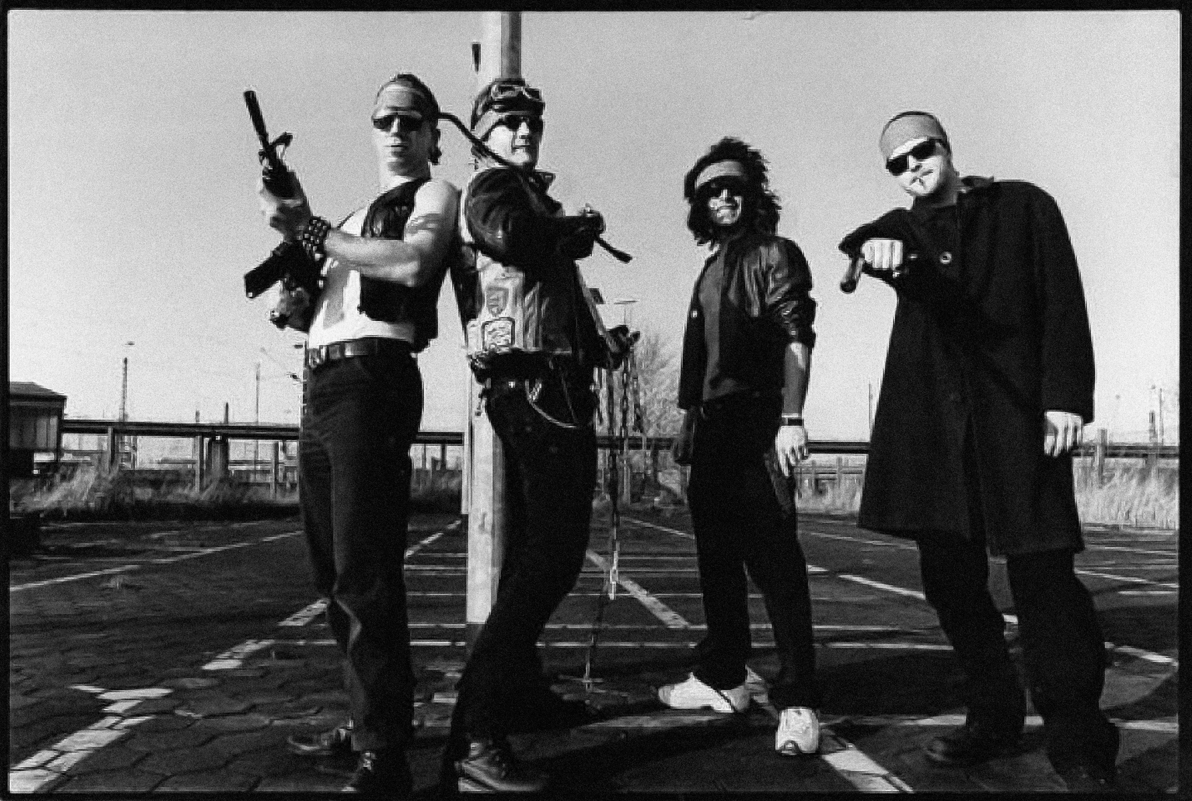 Bandfoto von 1999 zum zweiten Album "Zurück in die Bronx"